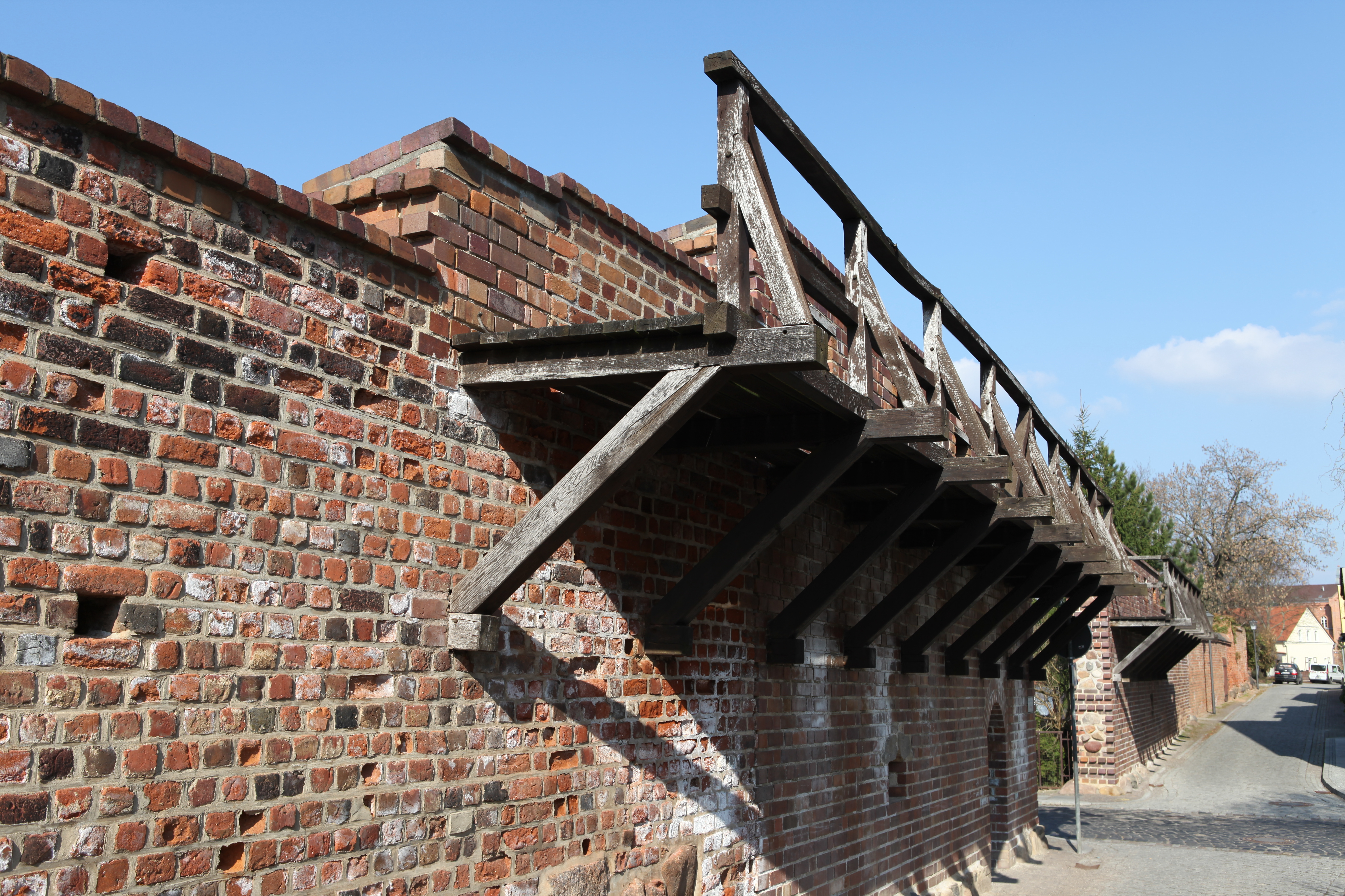 Stadtmauer in Delitzsch an der Pfortenstraße